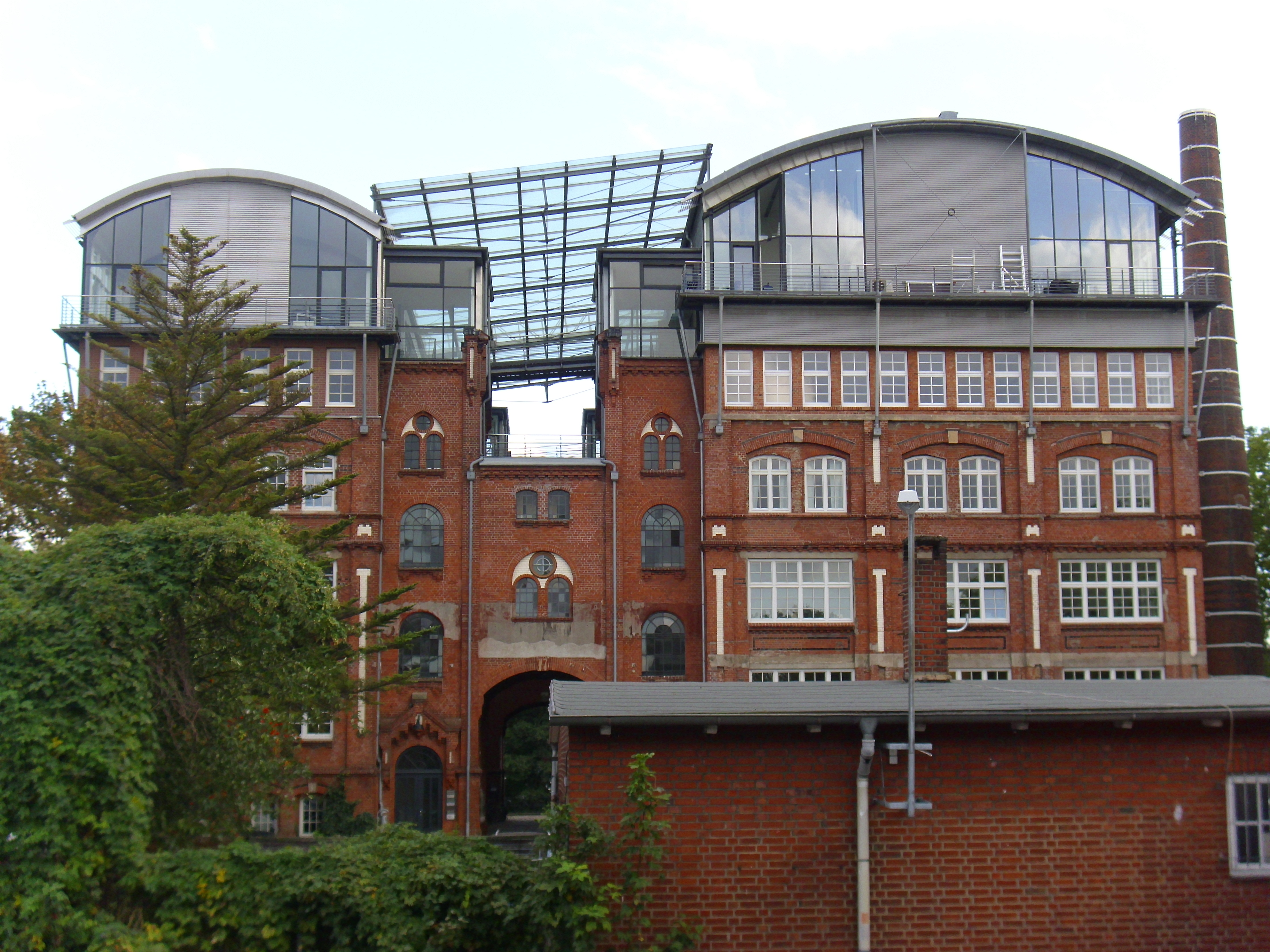 Wendenstraße 130 This is a photograph of an architectural monument.